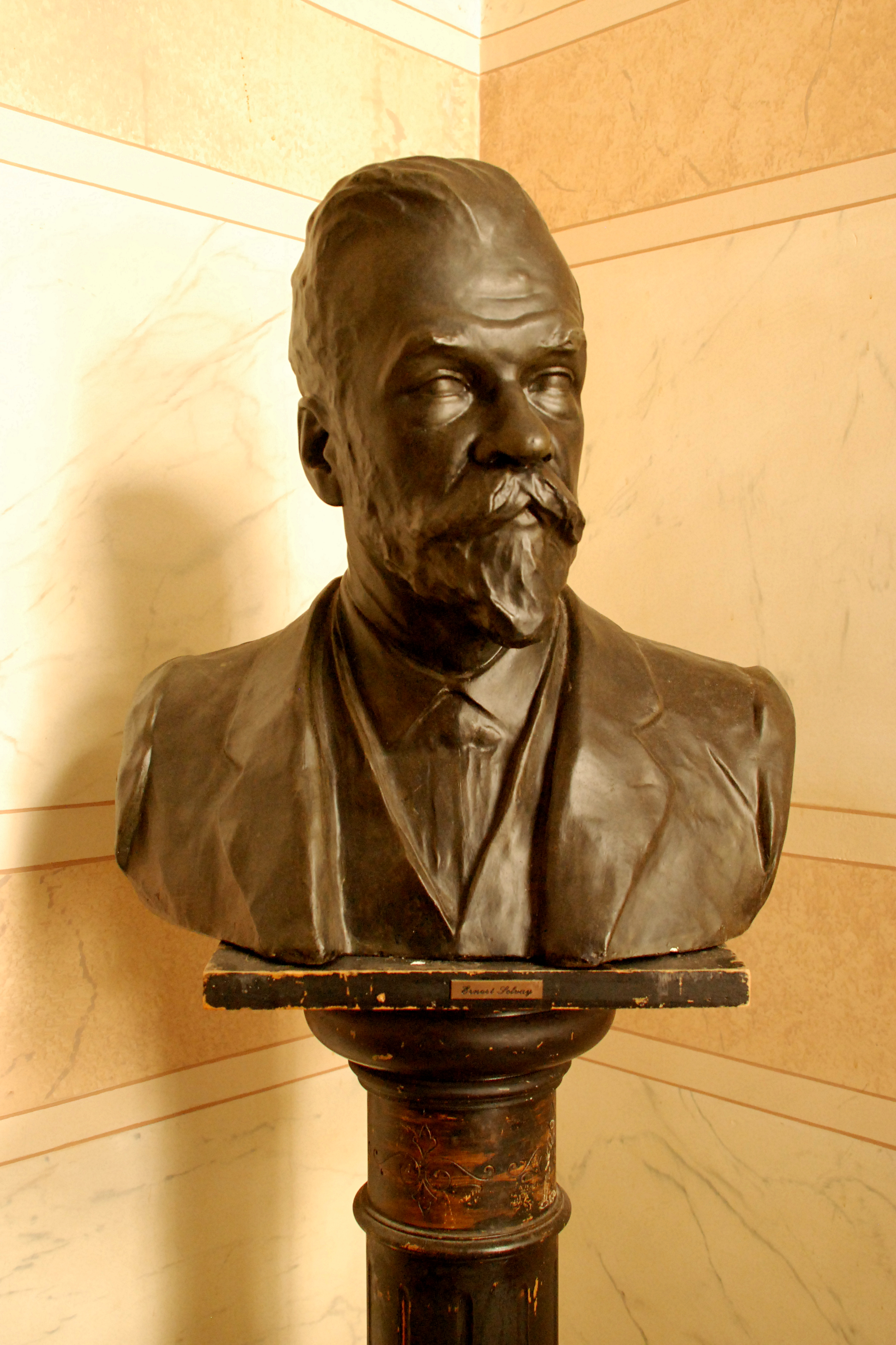 Belgique - Bruxelles - Bibliothèque Solvay